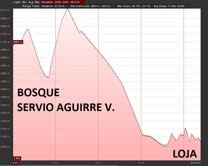 Perfil de altura entre el Bosque Protector Servio Aguirre y la Ciudad de Loja